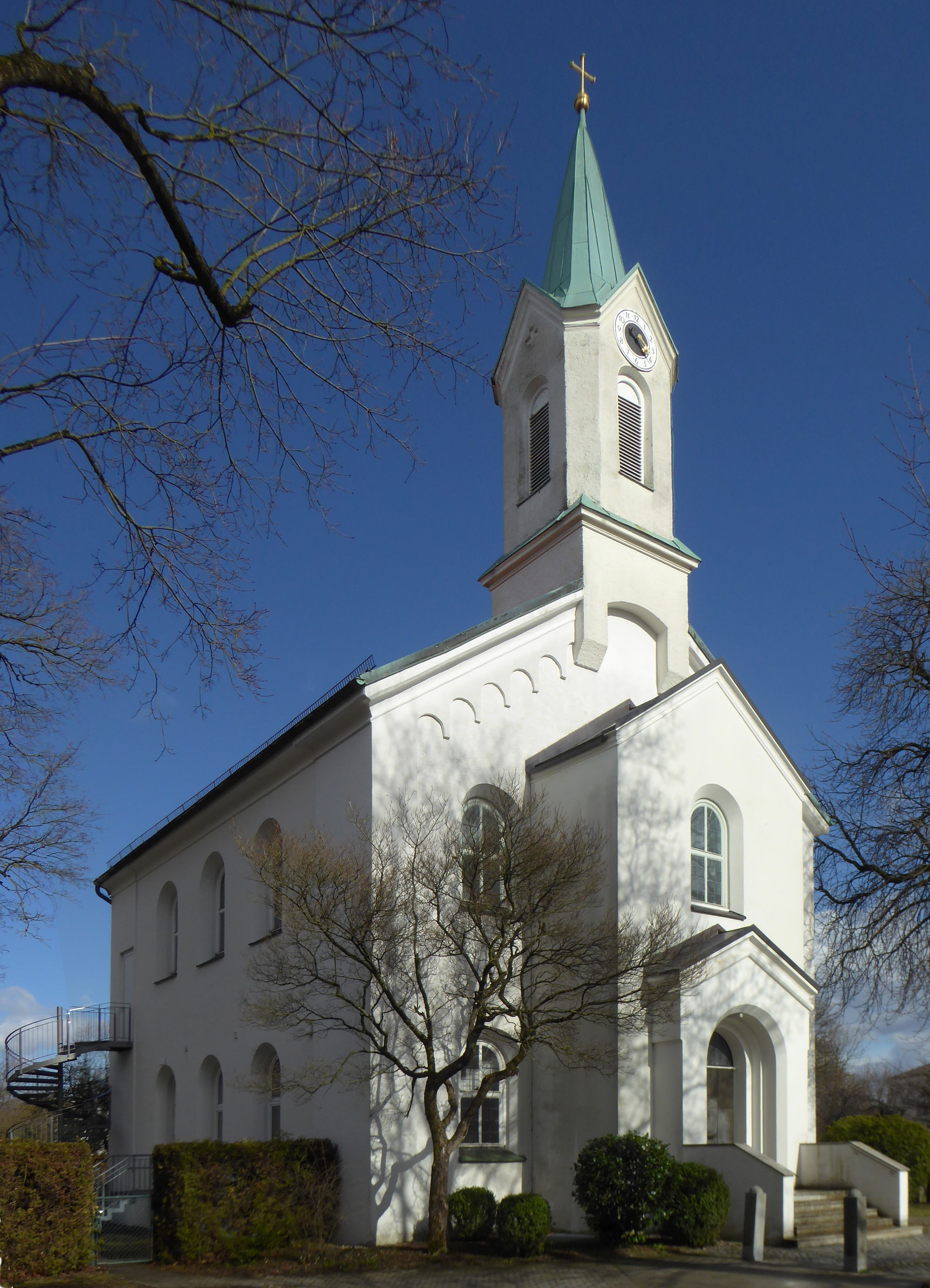 Feldkirchen (Lkr. München), die evangelisch-lutherische Kirche von Westen gesehen.